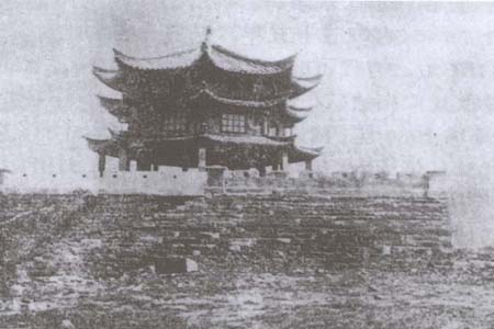 宁波旧城墙庆云楼（八角楼）